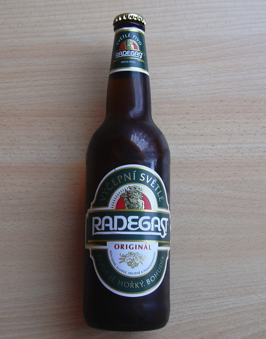 Radegast (Beer- czech republic)